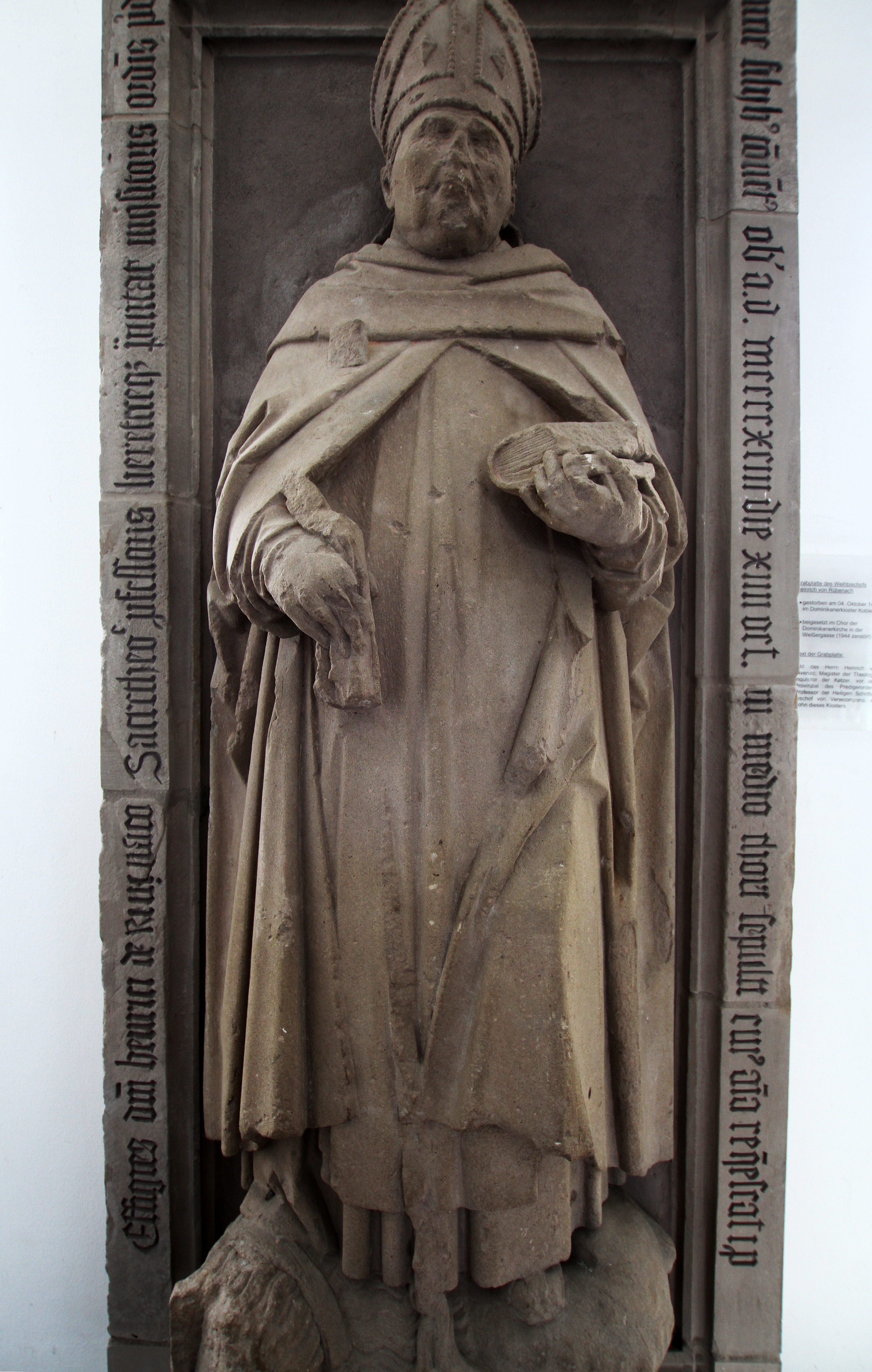 Koblenz, Rathaus II Gymnasialstraße. Epitaph des Heinrich von Rübenach im Erdgeschoss des Hauses. Von Rübenach (um 1420–1493), war in seiner Jugend Pater der Dominikaner in Koblenz. Später Theologieprofessor und erhielt die Bischofswürde. Nach einem wechselvollen Leben kehrte er in seine Heimatstadt zurück, in der er am 4. Oktober 1493 verstarb. Rübenach wurde im Chor der Predigerkirche a an der Koblenzer Weißergasse beigesetzt. Seine Grabplatte blieb erhalten und befindet sich in einem ehemaligen Gebäude des Jesuitenkollegs, dem heutigen Rathaus der Stadt.